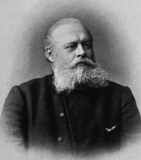 Portrait du chimiste Vladimir Vasilevich Markovnikov